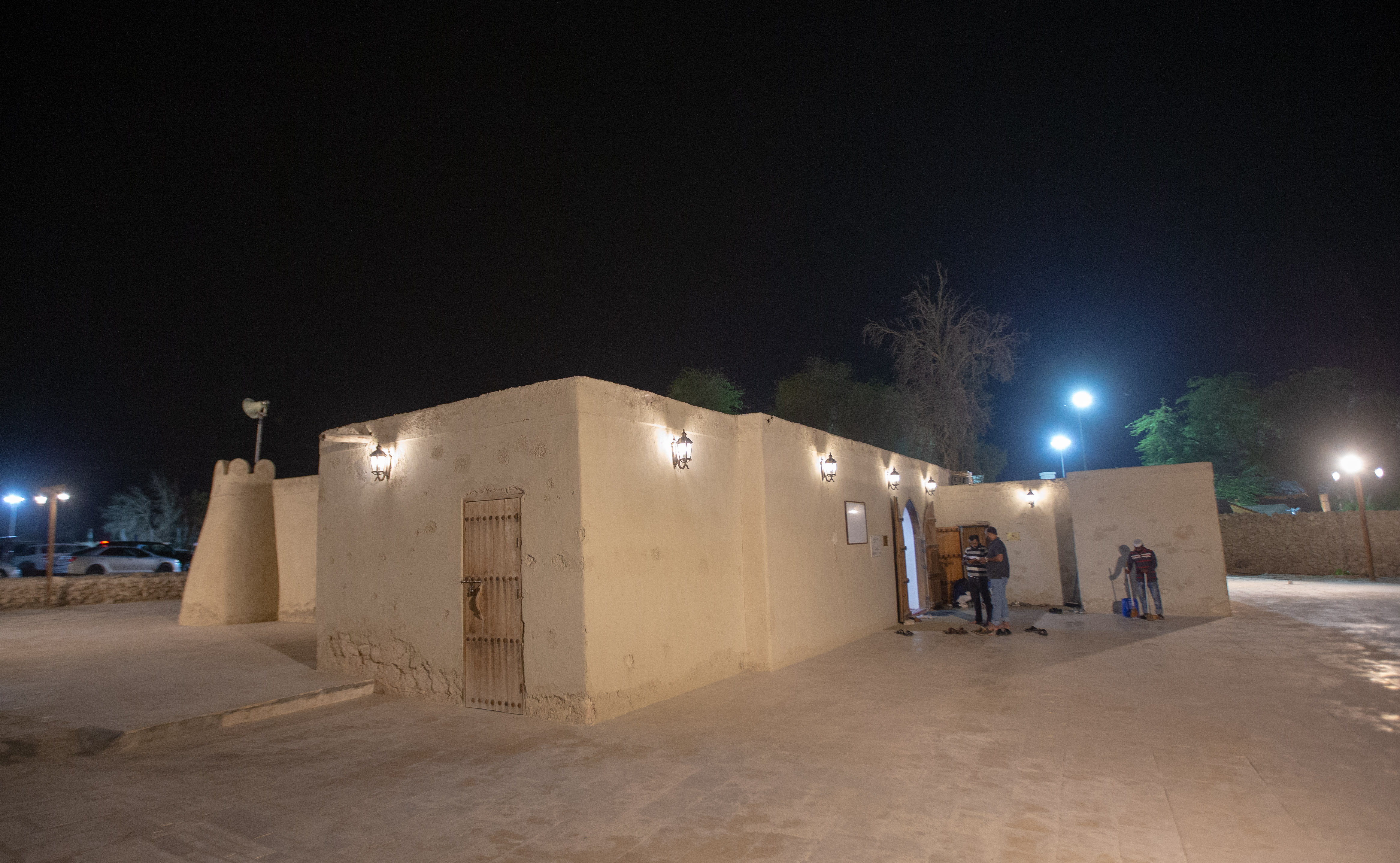 مسجد جواثى بعد الترميم